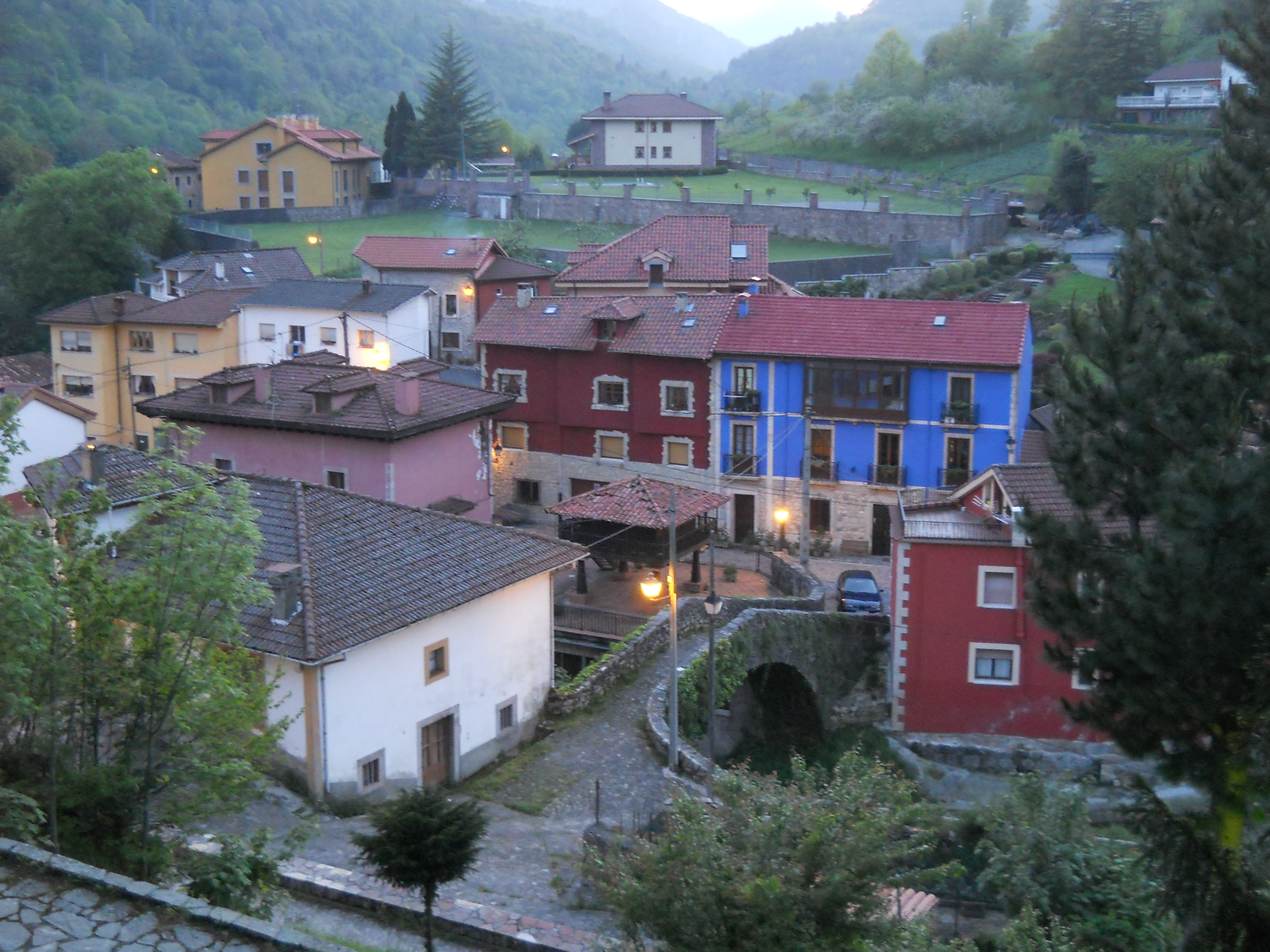 Carreña, Cabrales, Asturie, Spagna